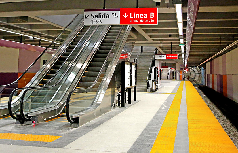 Estación Correo Central del Subte de Buenos Aires.